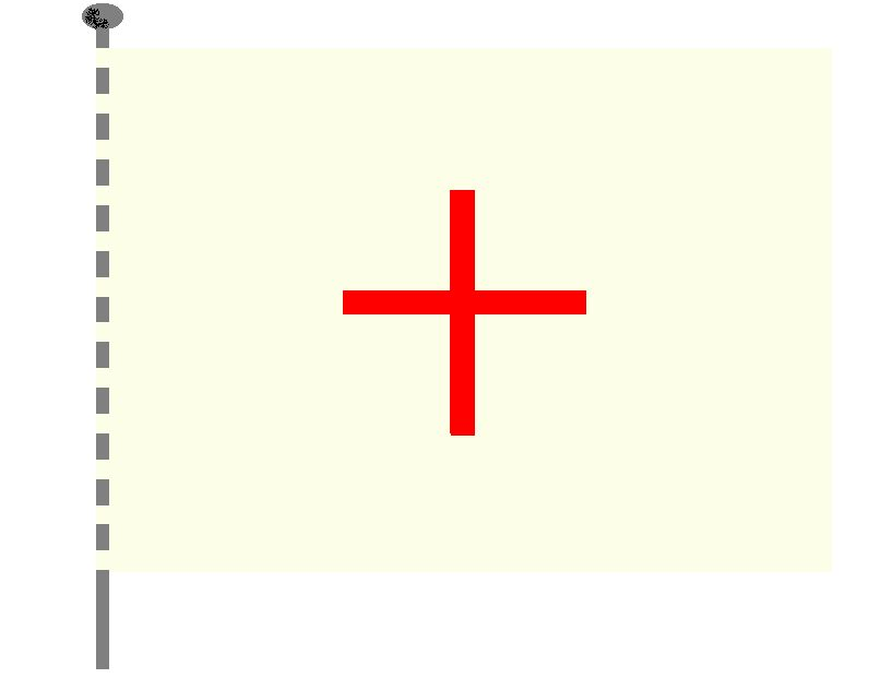 Flag as it was used in Tokowo at the start of the Second Serb Rebellion